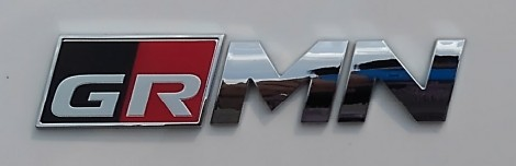 トヨタのスポーツカーブランド・GRMNのロゴ